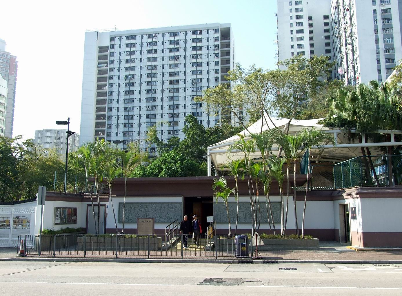 光明會外貌